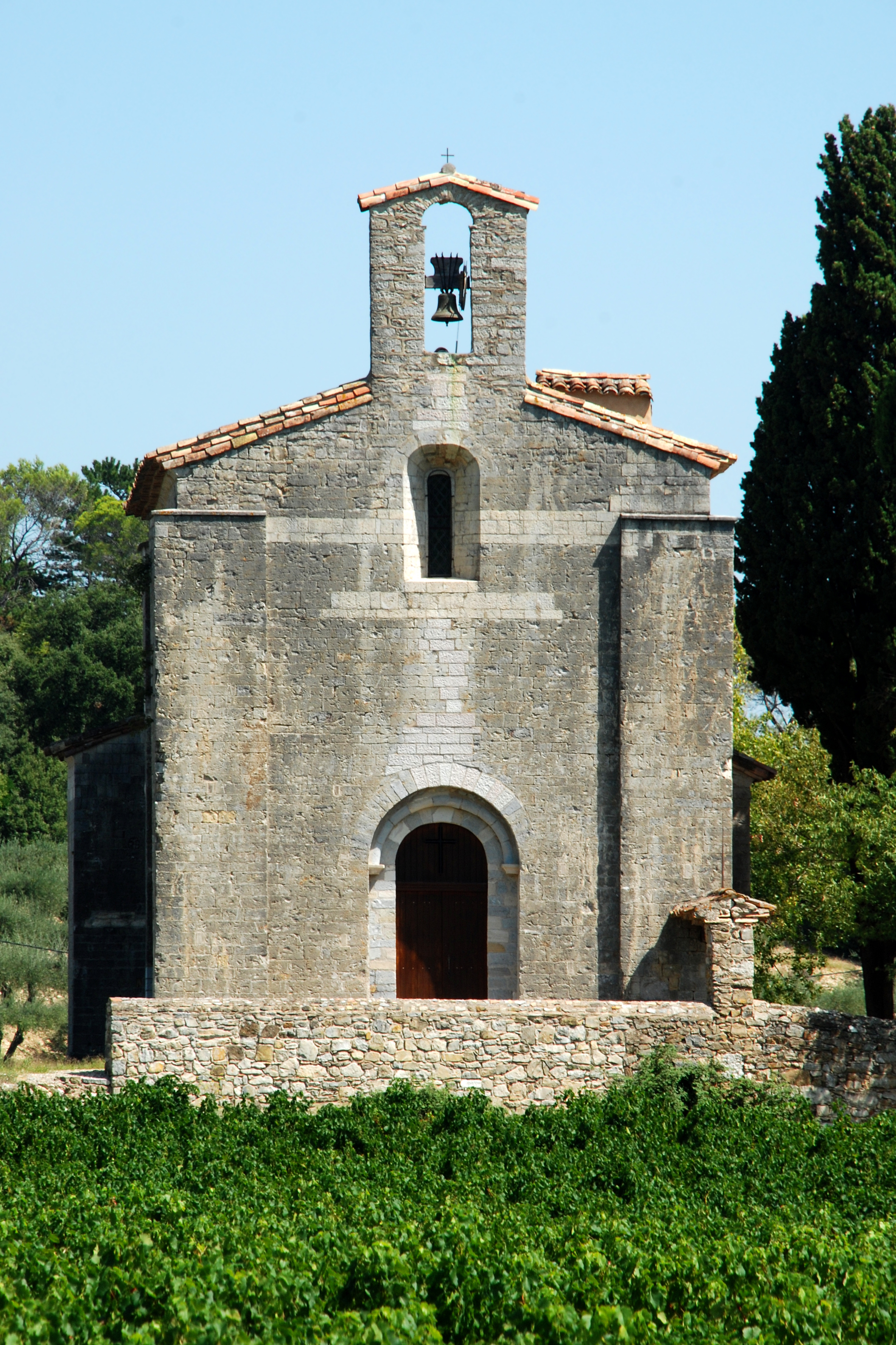 France - Gard - Église Saint-Baudile de Tornac